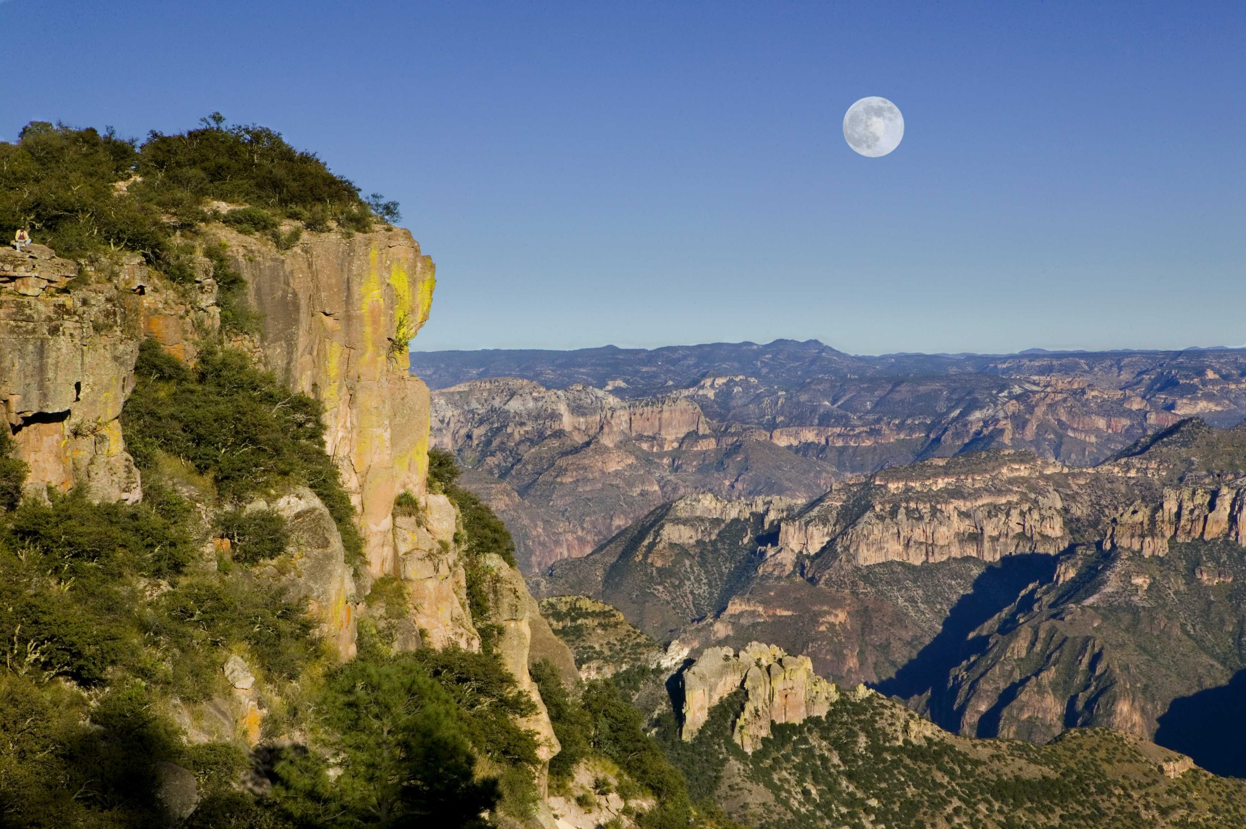 Divisadero, Barrancas del Cobre, Chihuahua